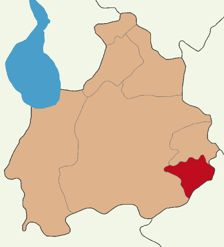 Güzelyurt ilçesinin konumu